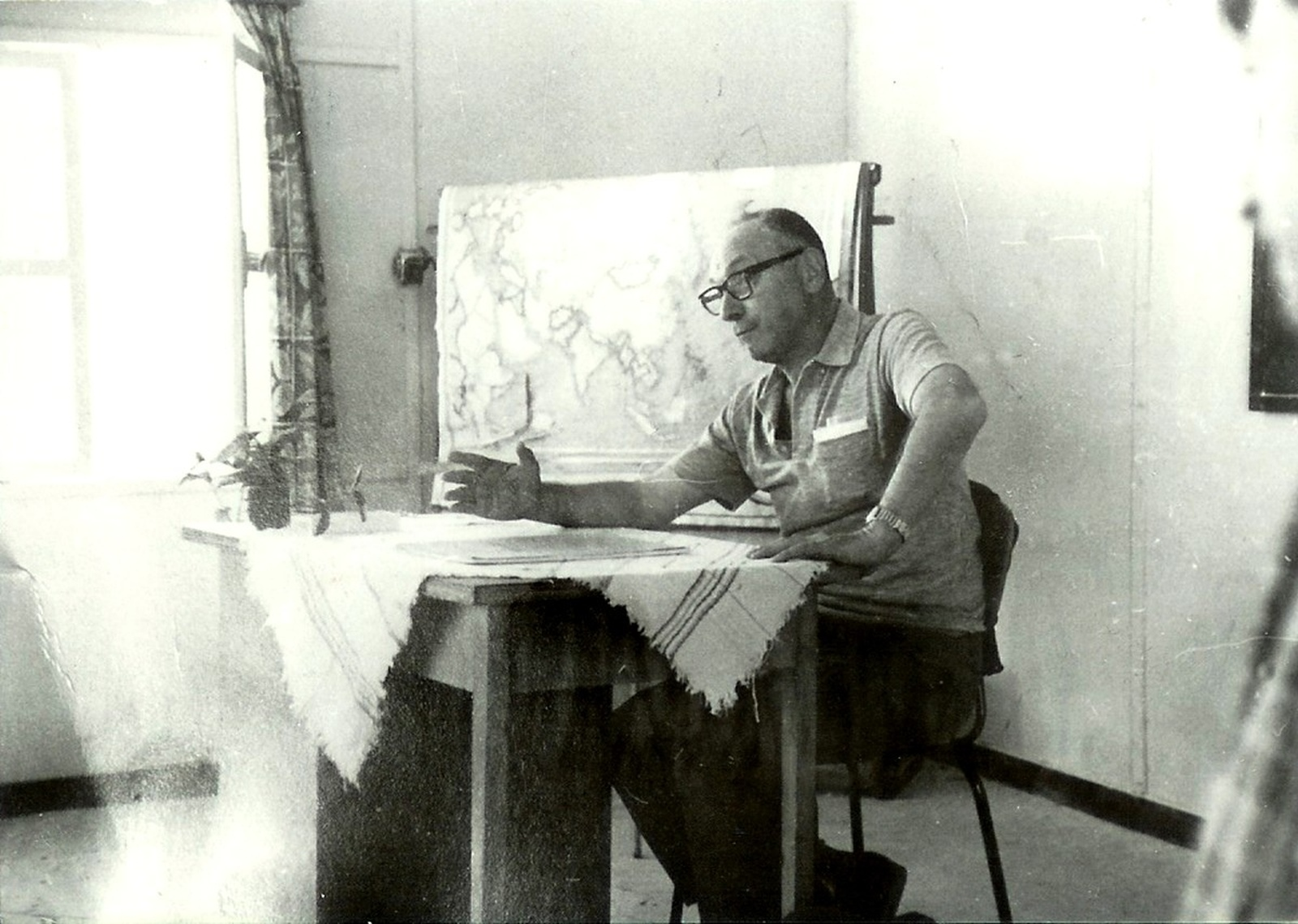 מנחם אורן מורה ומחנך